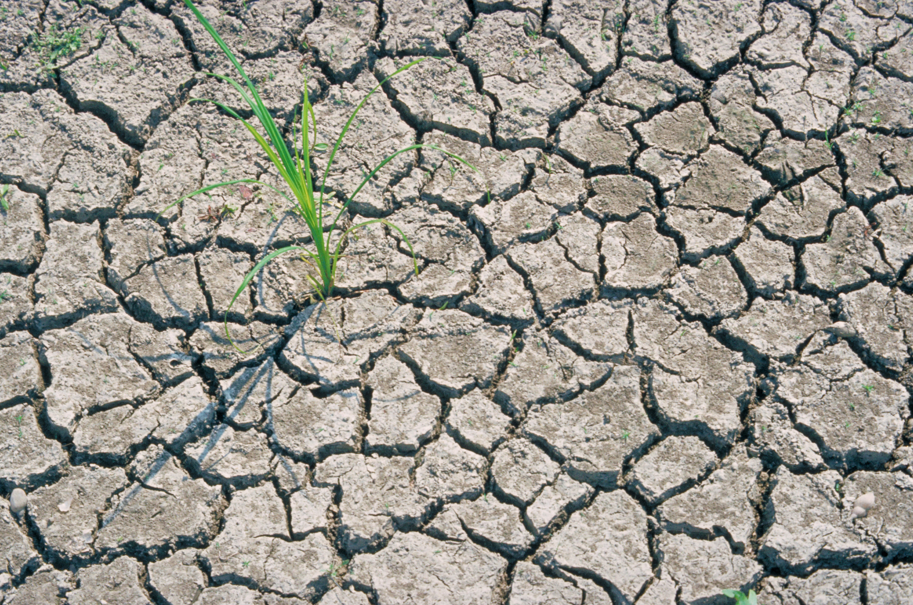 Aszály a tiszai ártér területén, Mártély közelében.